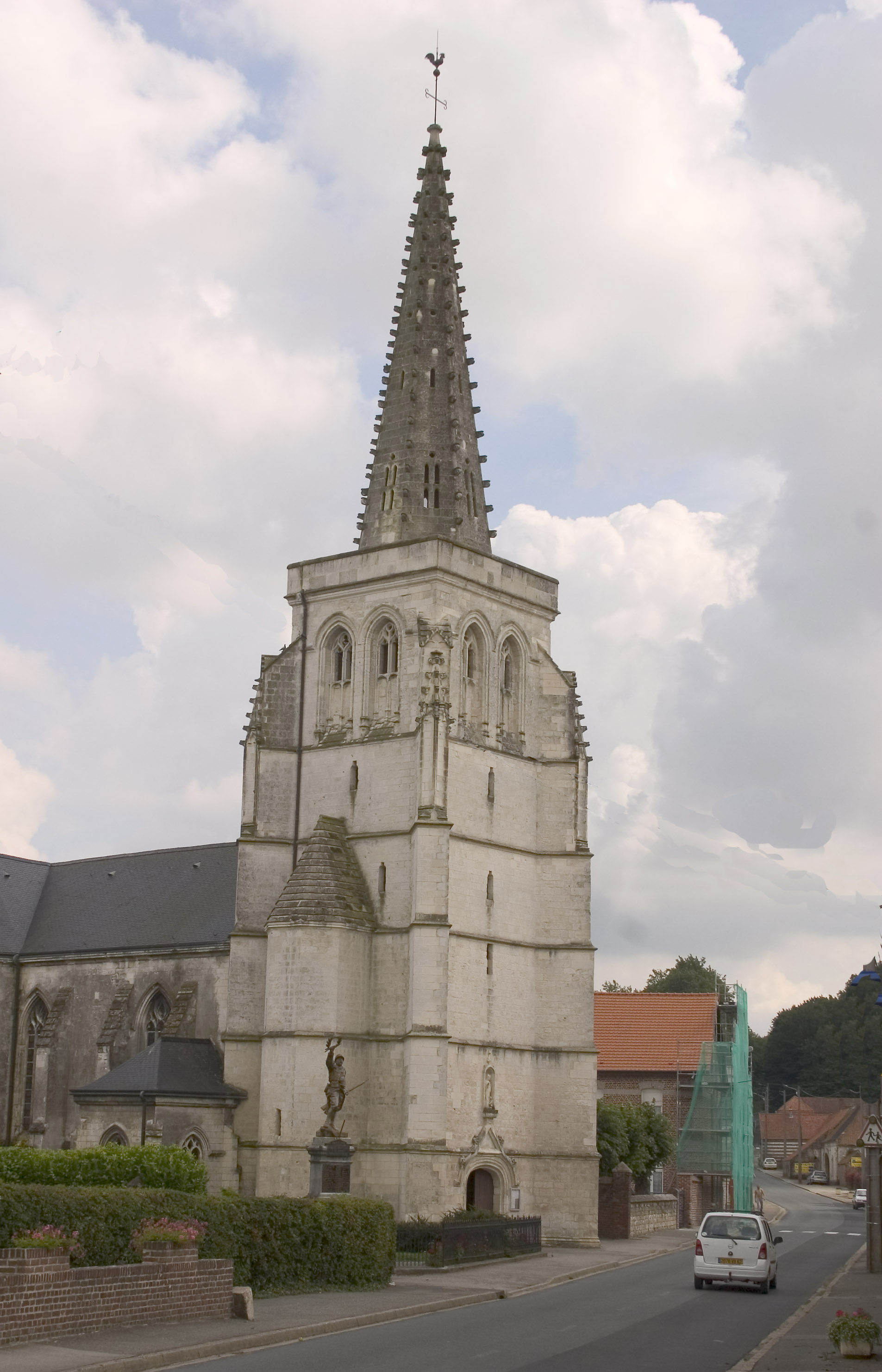 L'église d'Estrée-Blanche